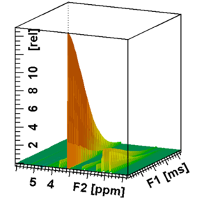 A jelintenzitás lecsengése a gradienserősség függvényében diffúziós NMR mérésnél